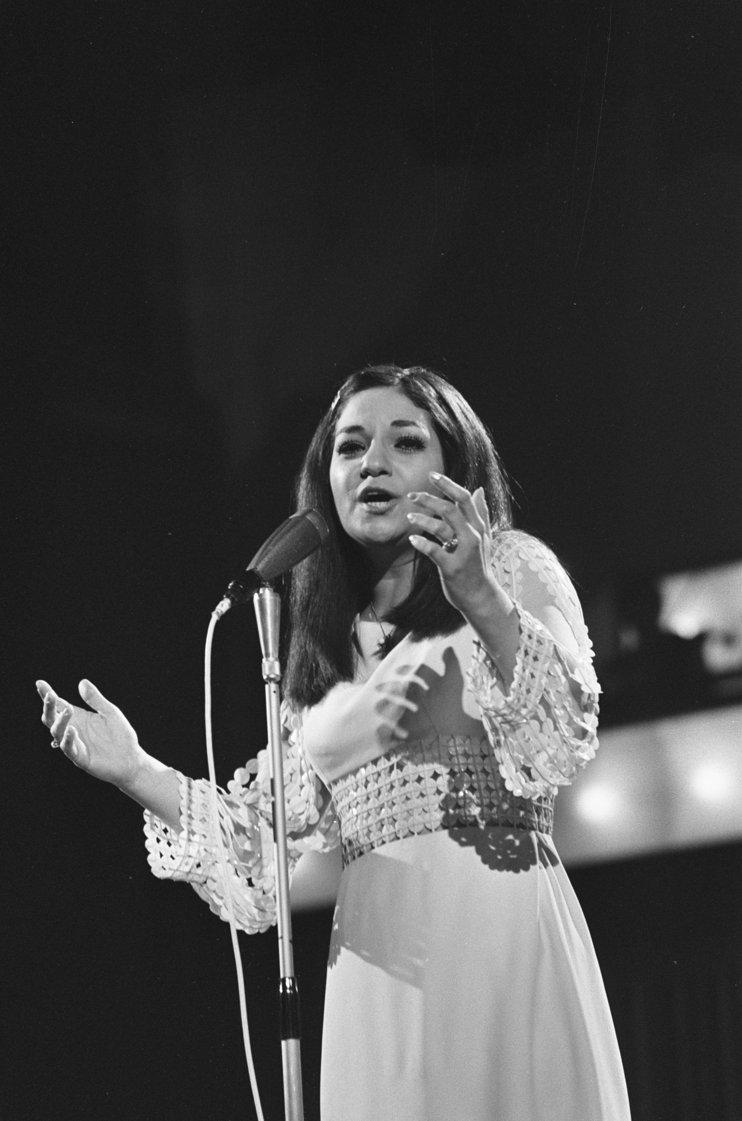 Collectie / Archief : Fotocollectie Anefo Reportage / Serie : [ onbekend ] Beschrijving : Grand Gala du Disque in RAI Amsterdam. Frida Boccara Datum : 27 februari 1970 Locatie : Amsterdam, Noord-Holland Persoonsnaam : Frida Boccara Instellingsnaam : RAI Fotograaf : Mieremet, Rob / Anefo Auteursrechthebbende : Nationaal Archief Materiaalsoort : Negatief (zwart/wit) Nummer archiefinventaris : bekijk toegang 2.24.01.05 Bestanddeelnummer : 923-3017